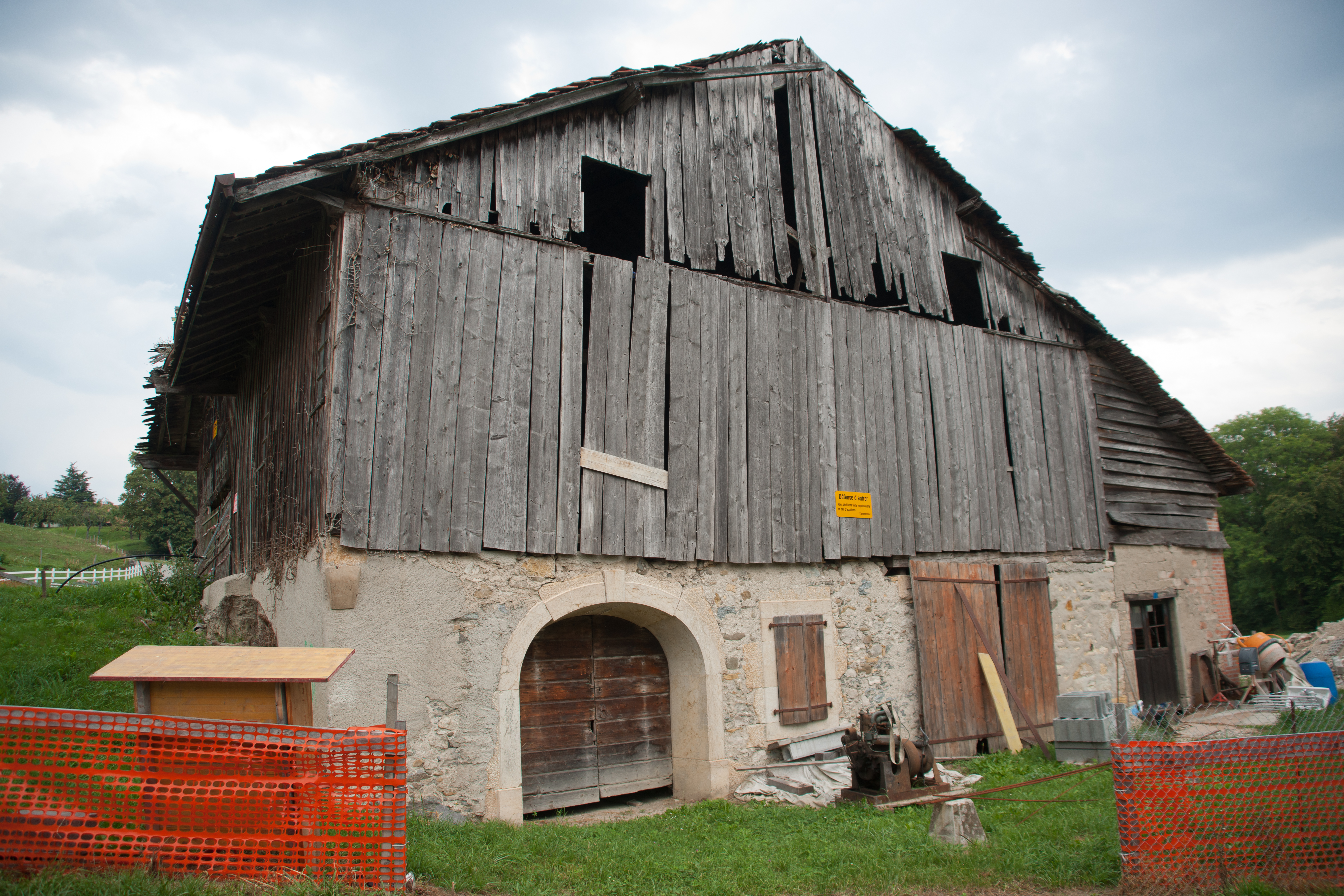 Scierie à Chavannes-le-Veyron. Travaux en 2011.